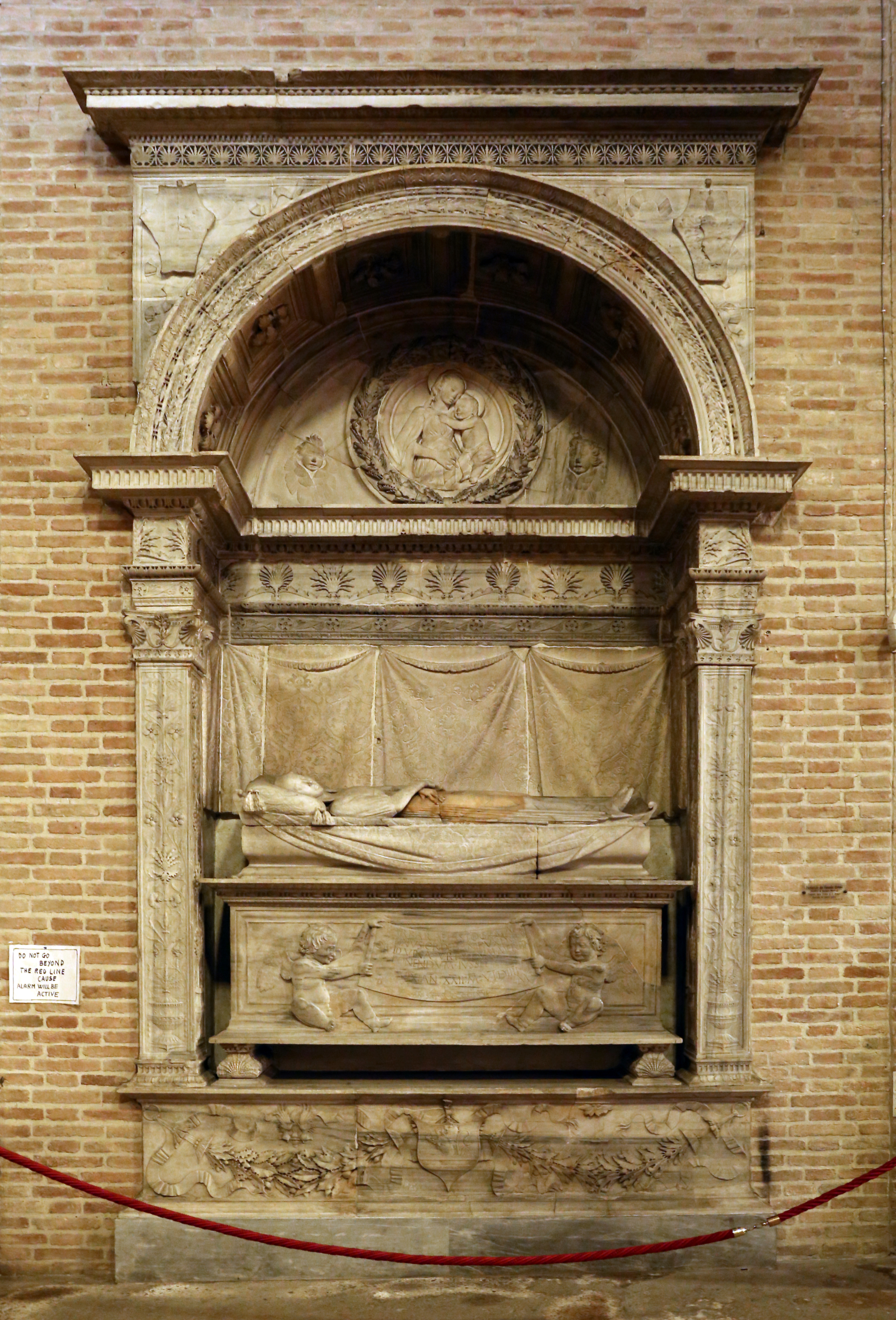 abbazia di San Mercuriale This is a photo of a monument which is part of cultural heritage of Italy.